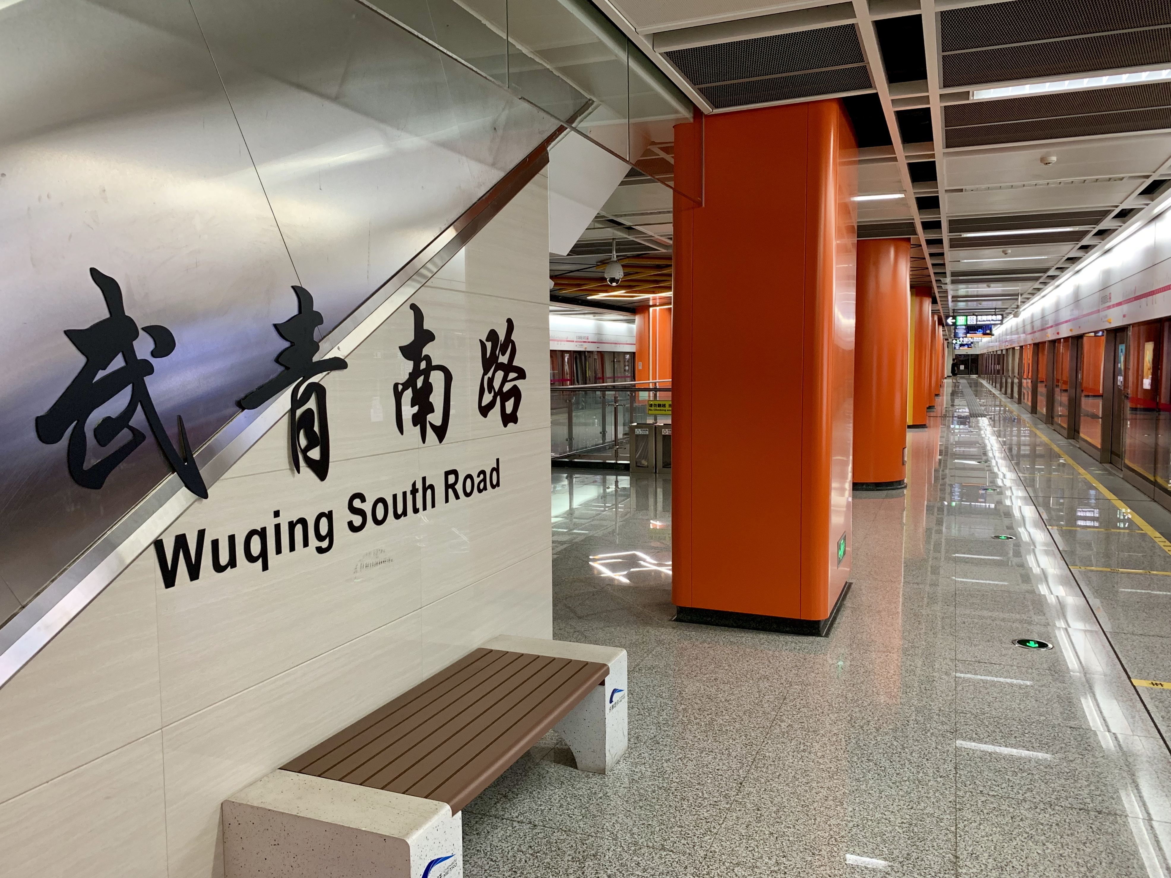 成都地铁武青南路站